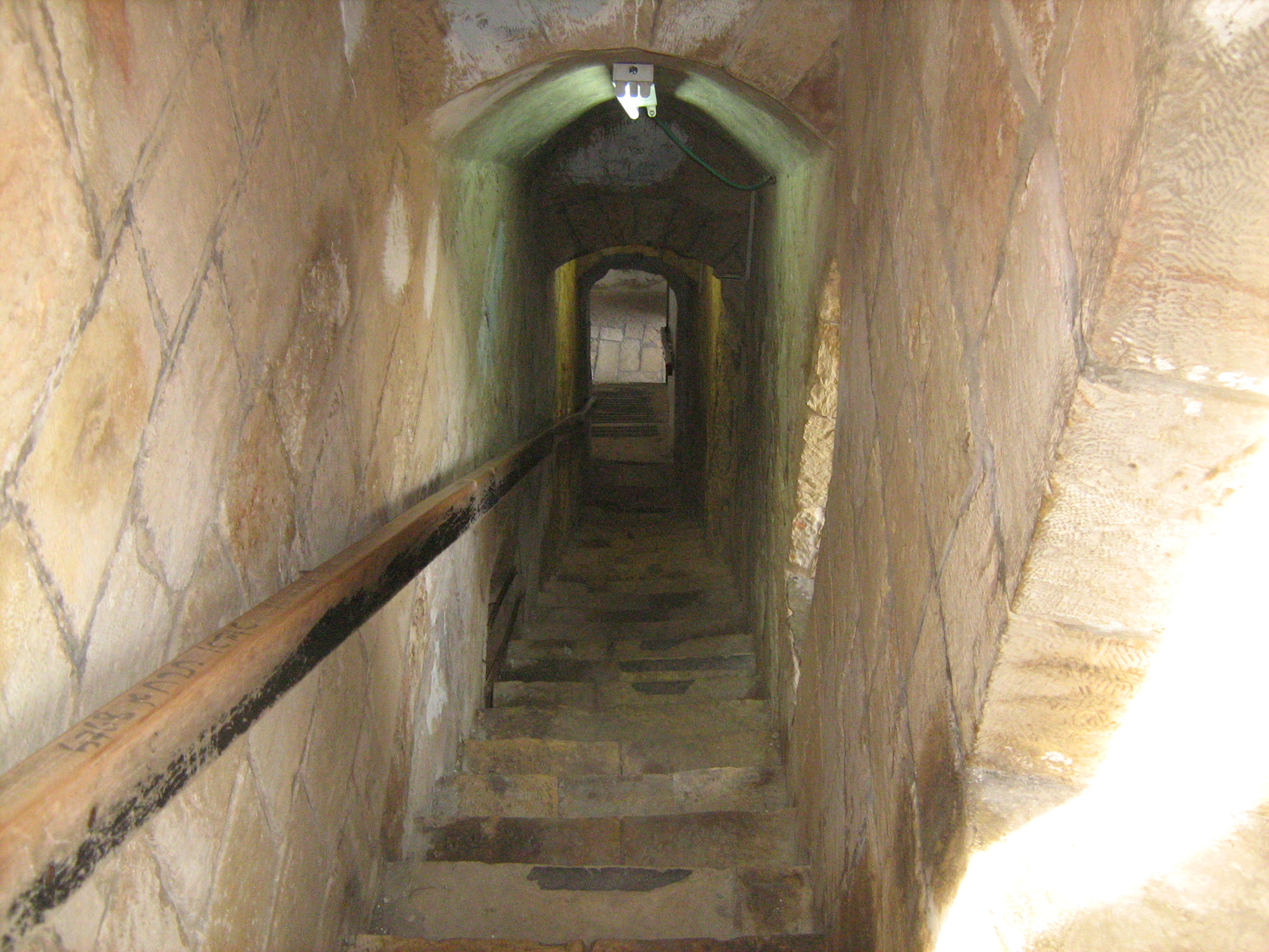 נבי סמואל